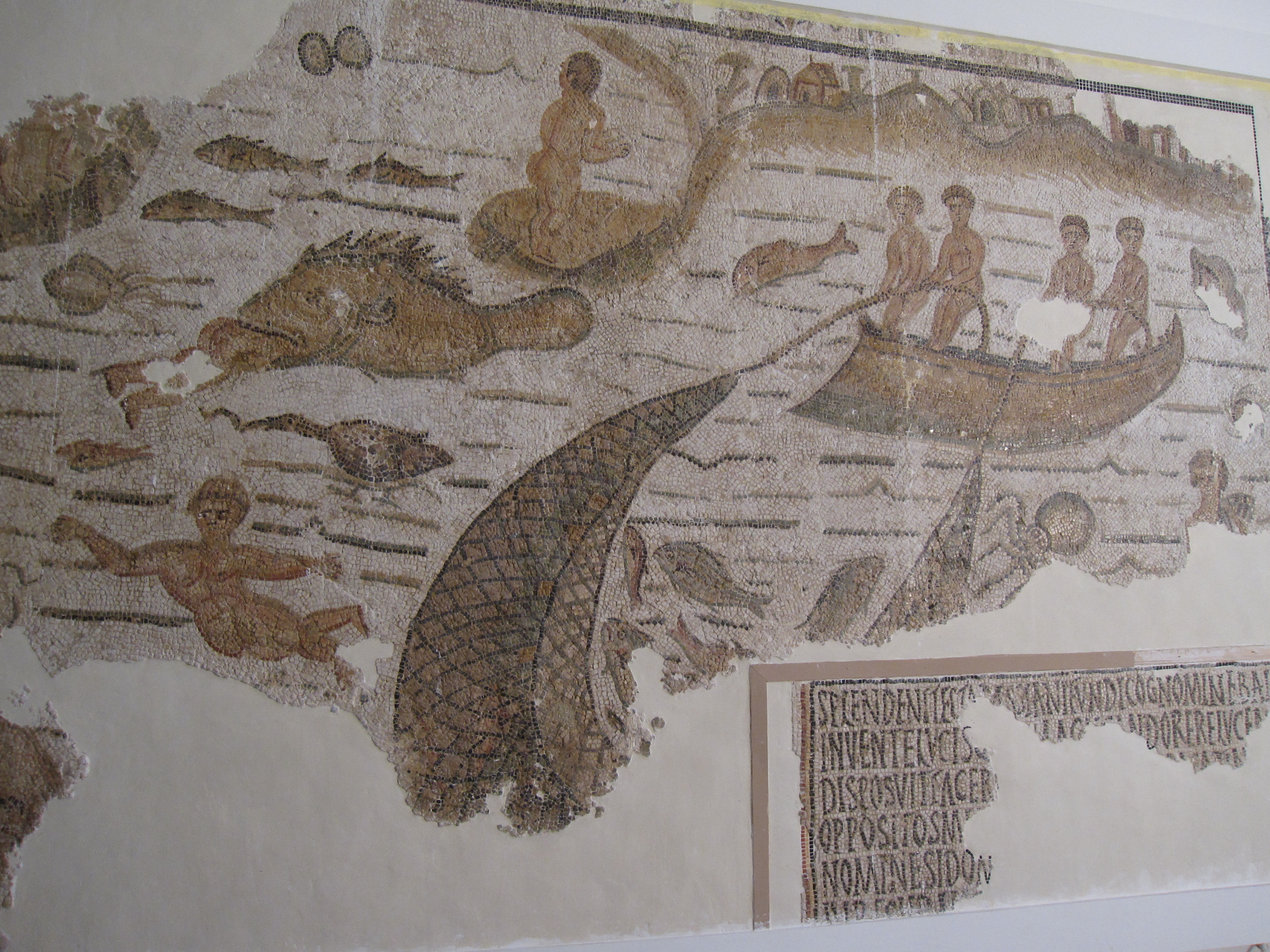 صورة في المتحف الوطني بباردو